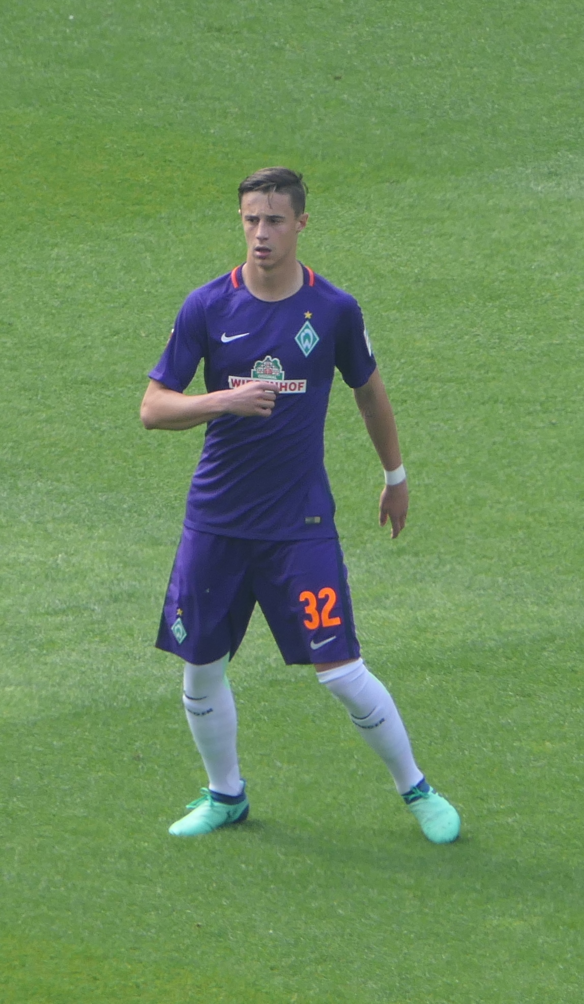 Der Fussballprofi Marco Friedl im Trikot vom SV Werder Bremen beim Auswärtsspiel gegen den FSV Mainz 05 am 12.05.2018.